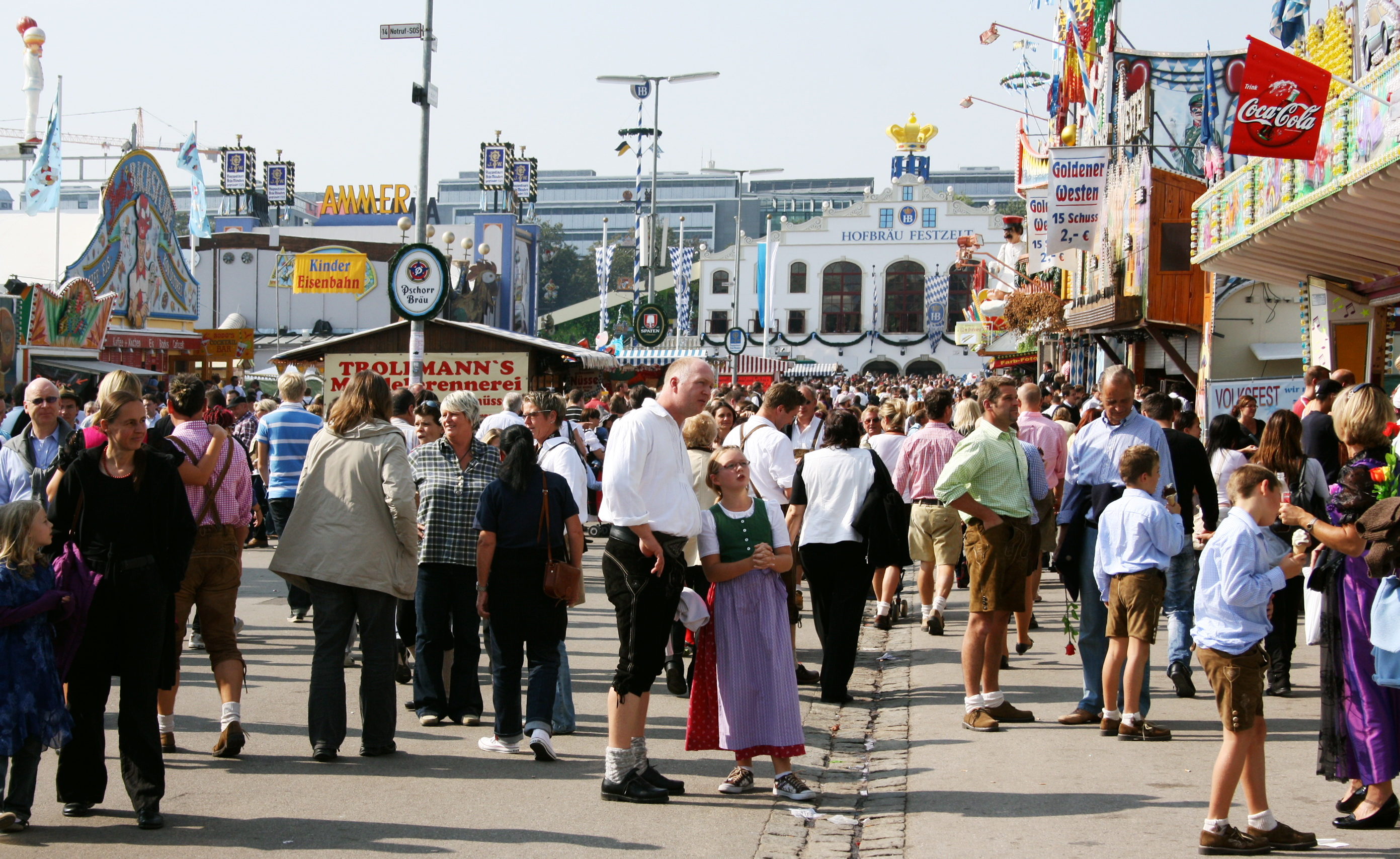 Straße auf der Theresienwiese während des Oktoberfest 2009. Im Hintergrund das Hofbräuzelt.